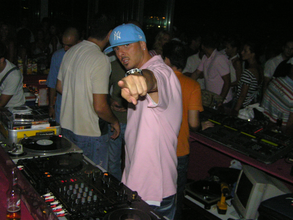 Nikos Vourliotis @ Balux